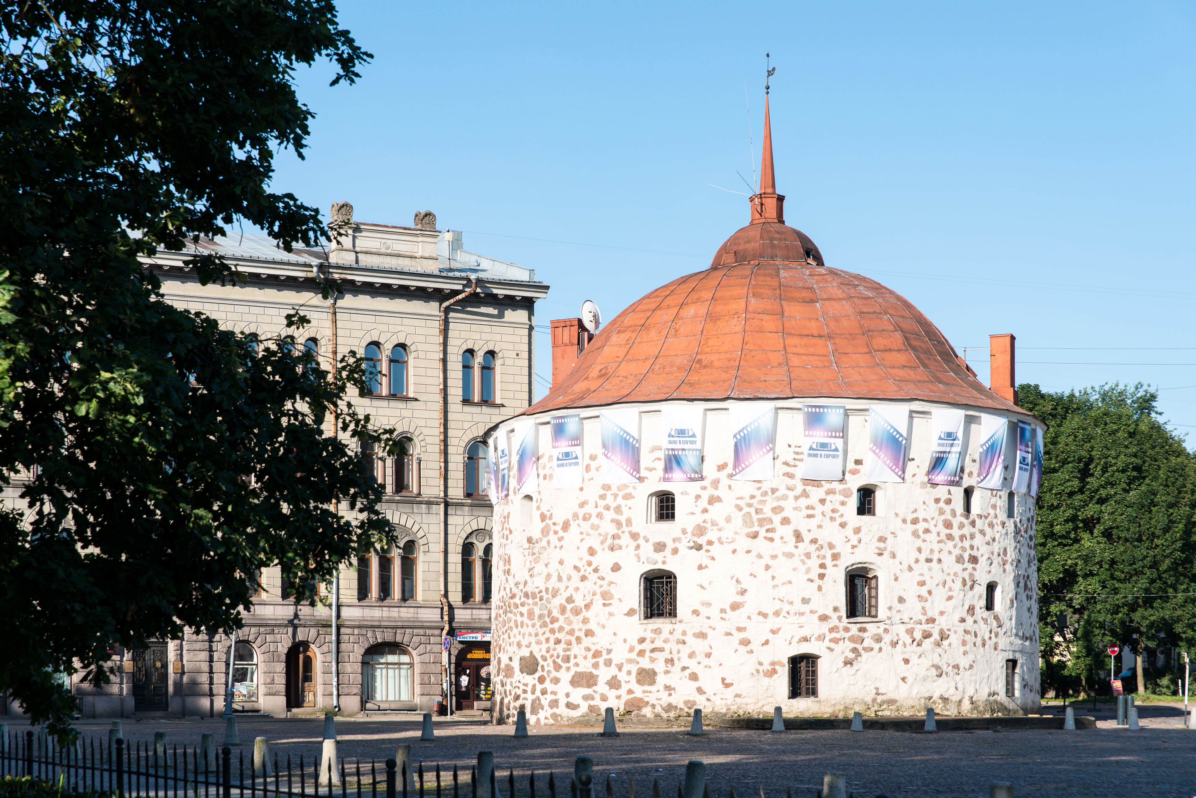 Круглая башня: площадь Рыночная, Выборг, Выборгский район, Ленинградская область